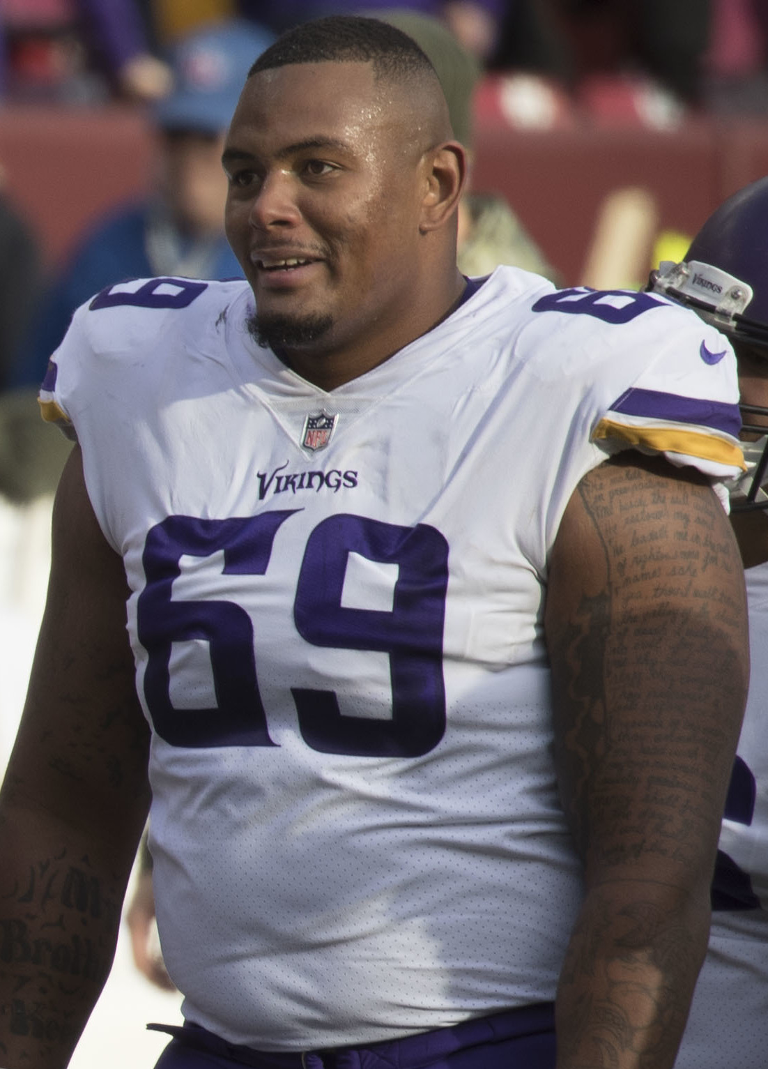 Vikings at Redskins 11/12/17